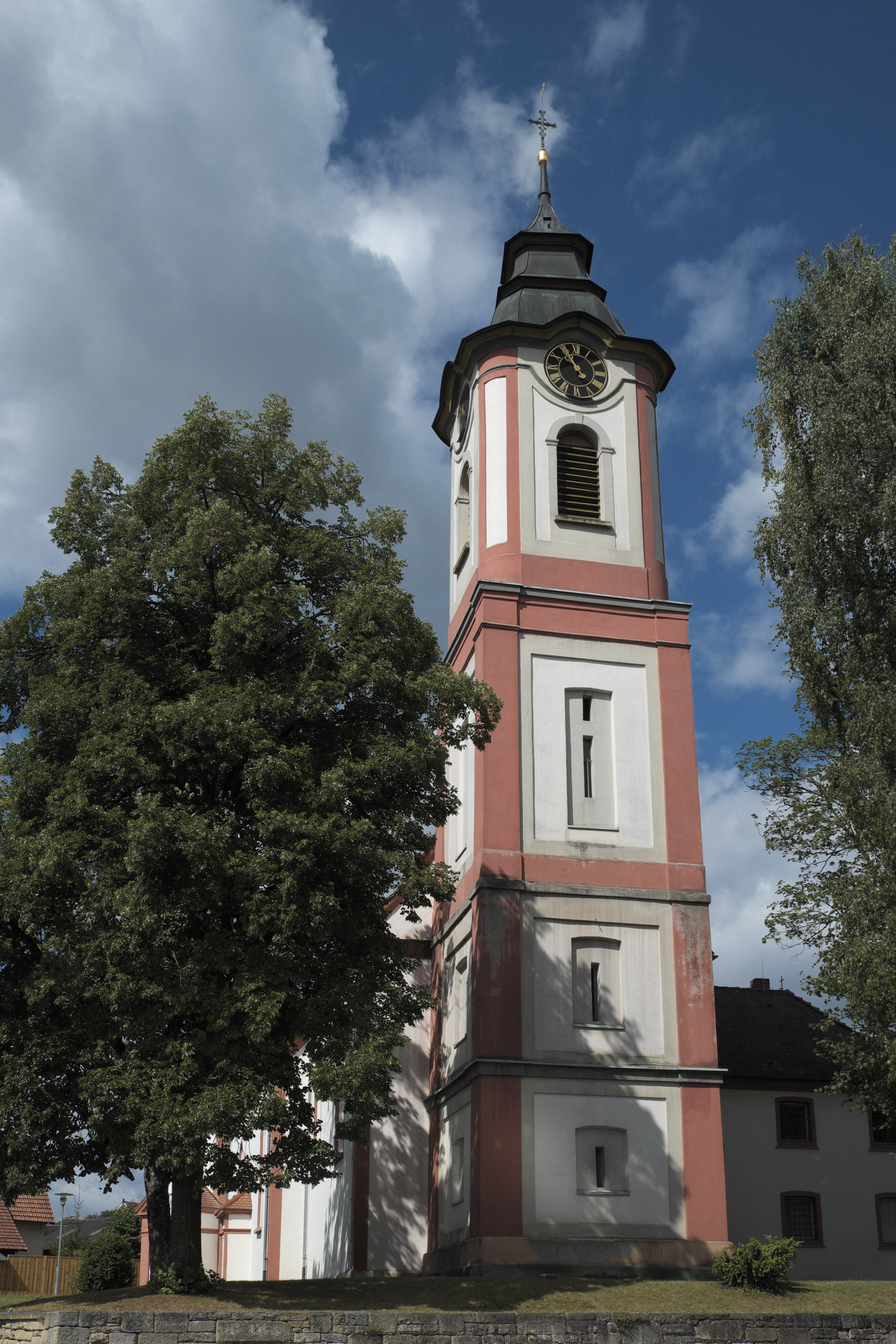 Katholische Pfarrkirche St. Gordian und Epimachus in Watterdingen, einem Stadtteil von Tengen im Landkreis Konstanz (Baden-Württemberg/Deutschland), Kirchturm, 1768 nach Plänen von Franz Anton Bagnato errichtet